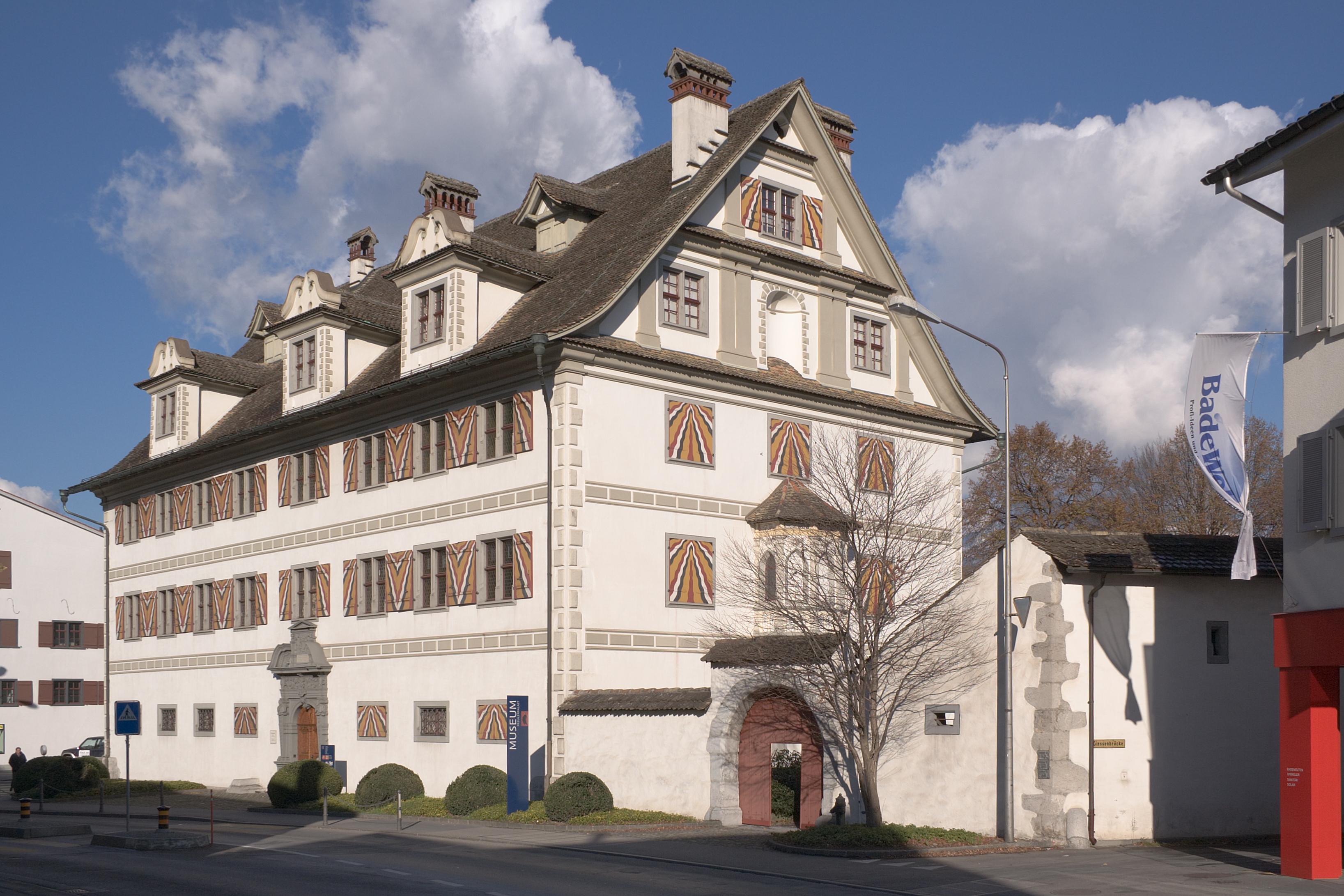 Freulerpalast in Näfels, SchweizBeinhaltet 2005 das Landesmuseum Glarus